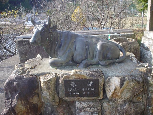 三重県熊野市にある松葉山天満宮の牛の像。